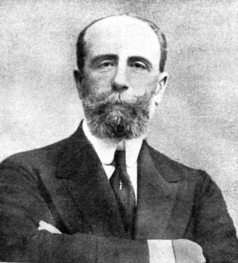 Excmo sr.D. Mariano Fernández de Henestrosa y Mioño